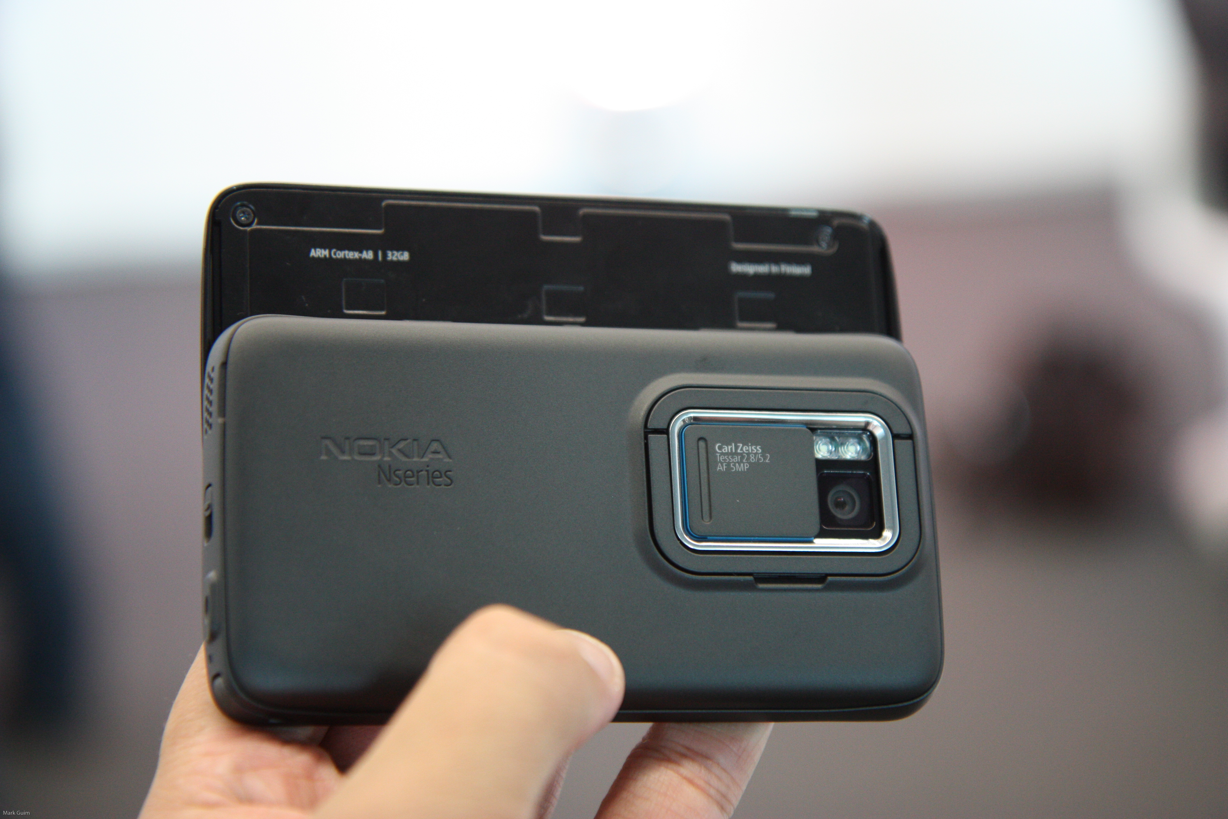 Nokia N900 back side, slide open.